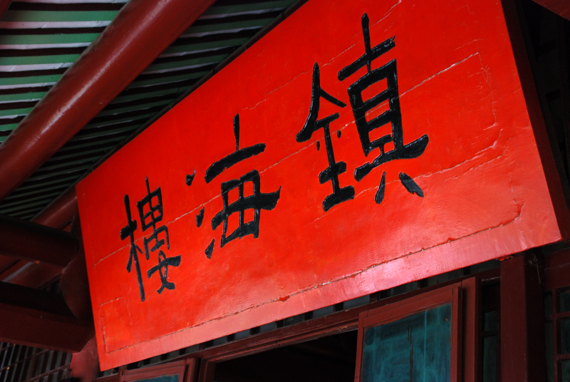 鎮海樓牌匾